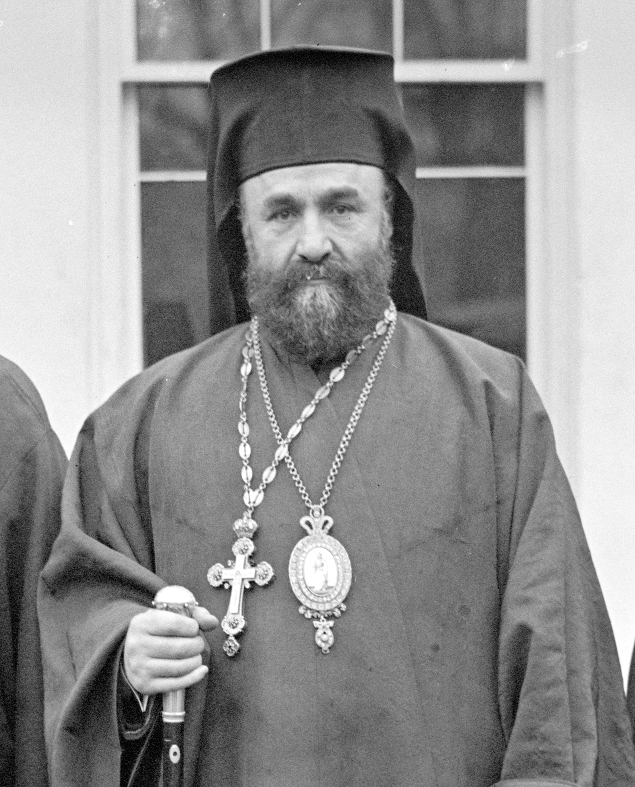 епископ Василий (Комвопулос) в США